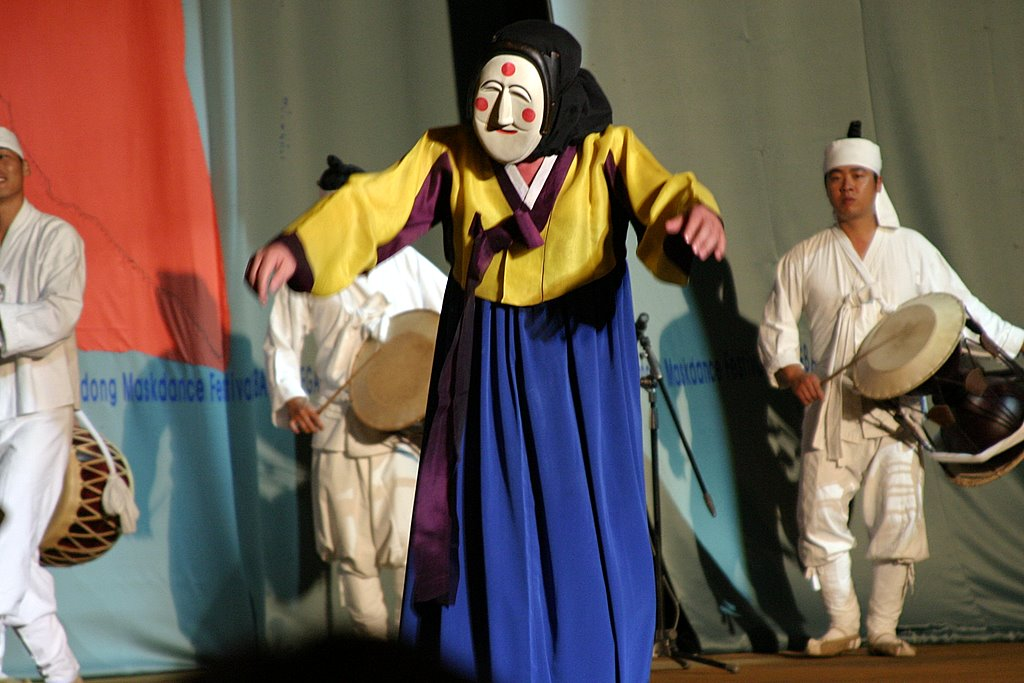 Hahoe Folk Village in Andong, Gyeongsangbuk-do, South Korea.